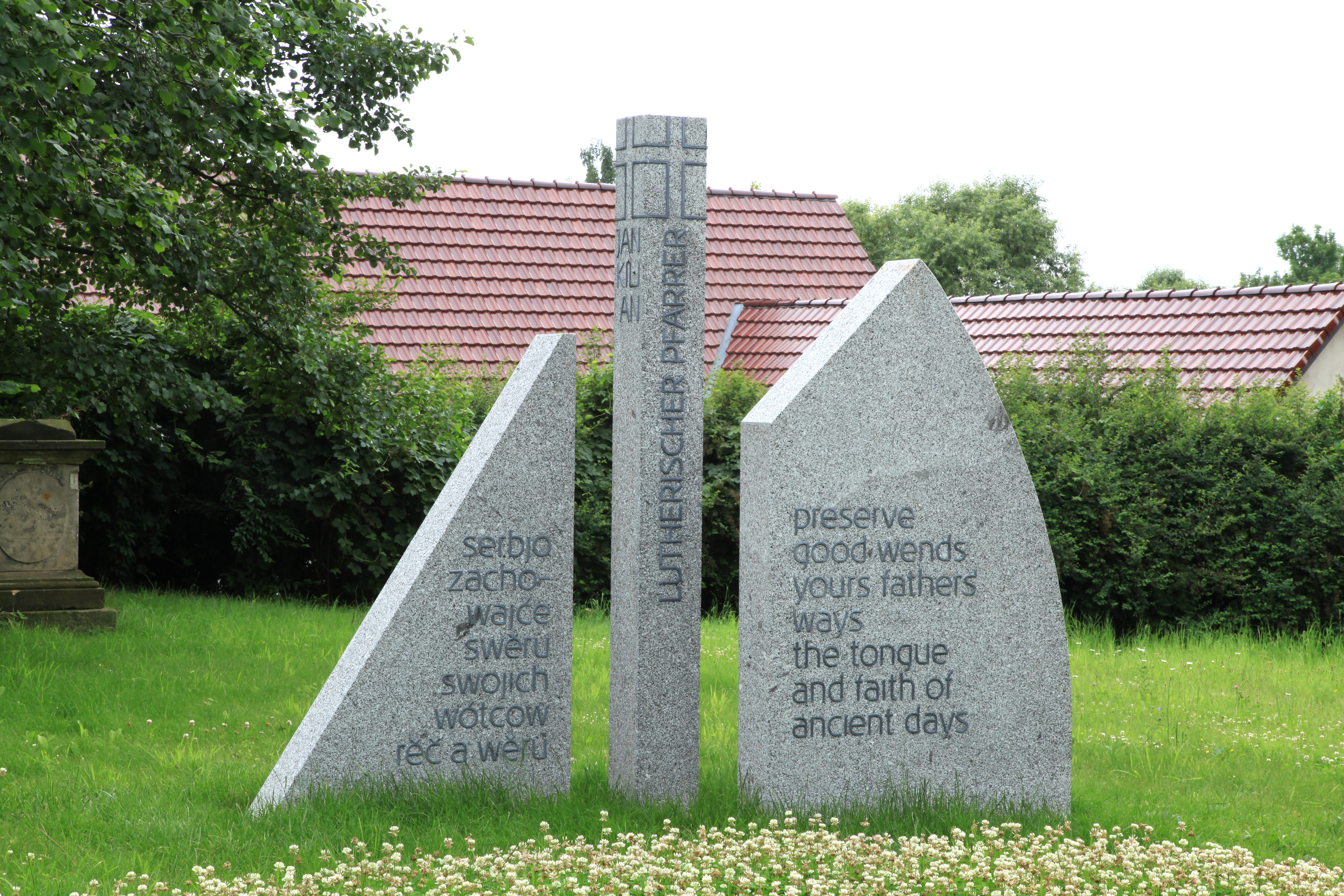 Jan-Kilian-Denkmal hinter der Kirche Kotitz, Jan-Kilian-Straße, Kotitz in Weißenberg Hornjoserbsce: Trojorěčny pomnik Janej Kilianej za Kotečanskej cyrkwju.